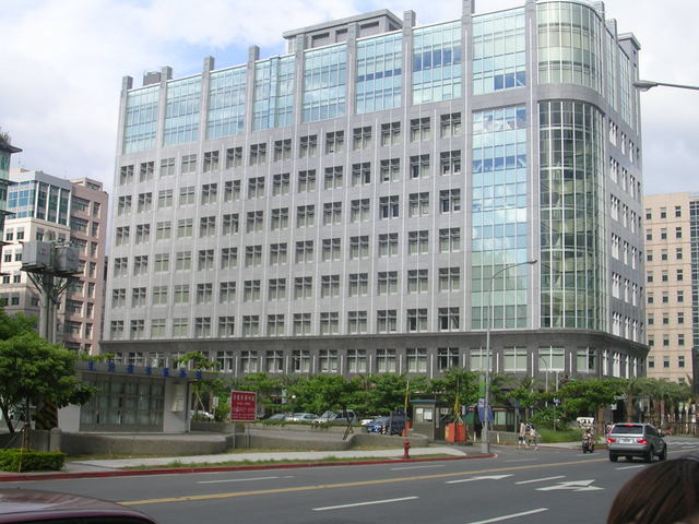 八大電視總部大樓，位於臺北市內湖區瑞光路455、457號。